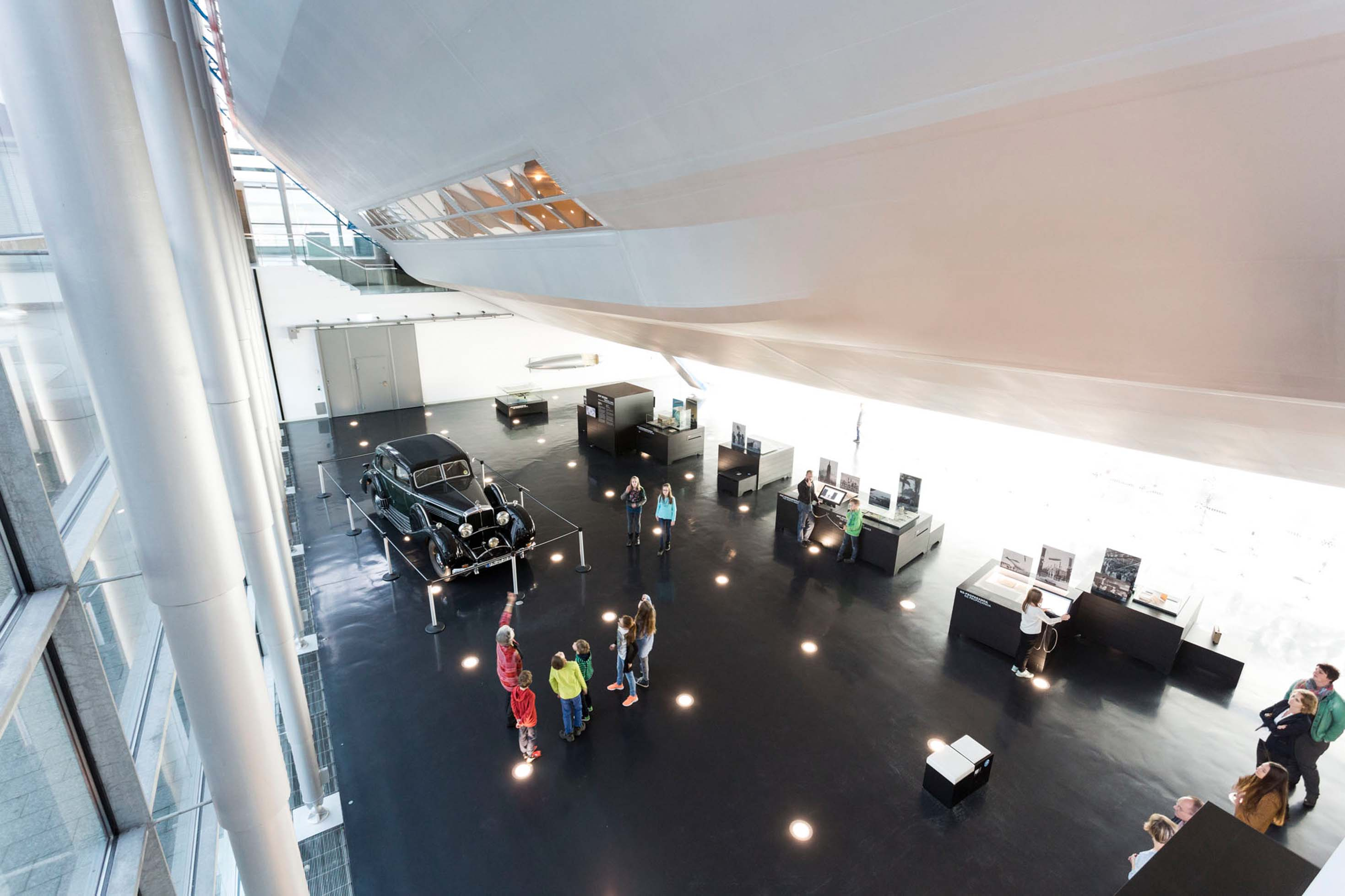 Zeppelinhalle, © Zeppelin Museum, Foto: Alexander Fischer